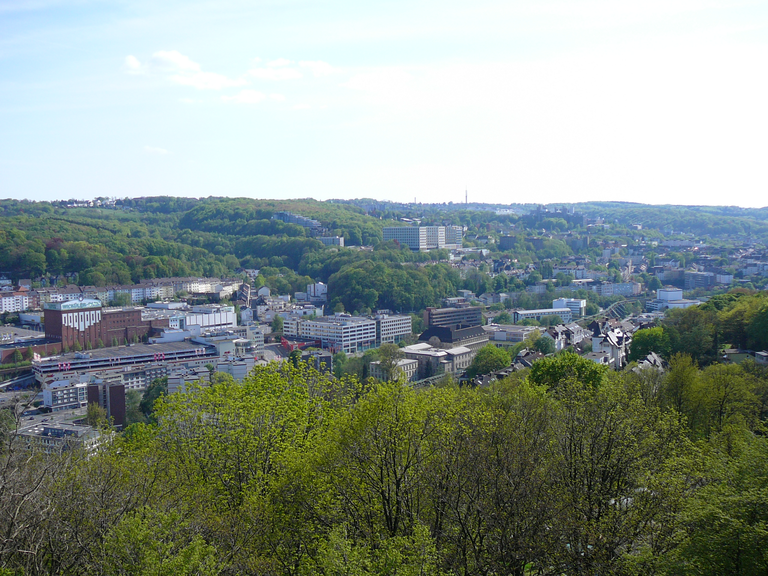 Hardt-Anlagen, Wuppertal